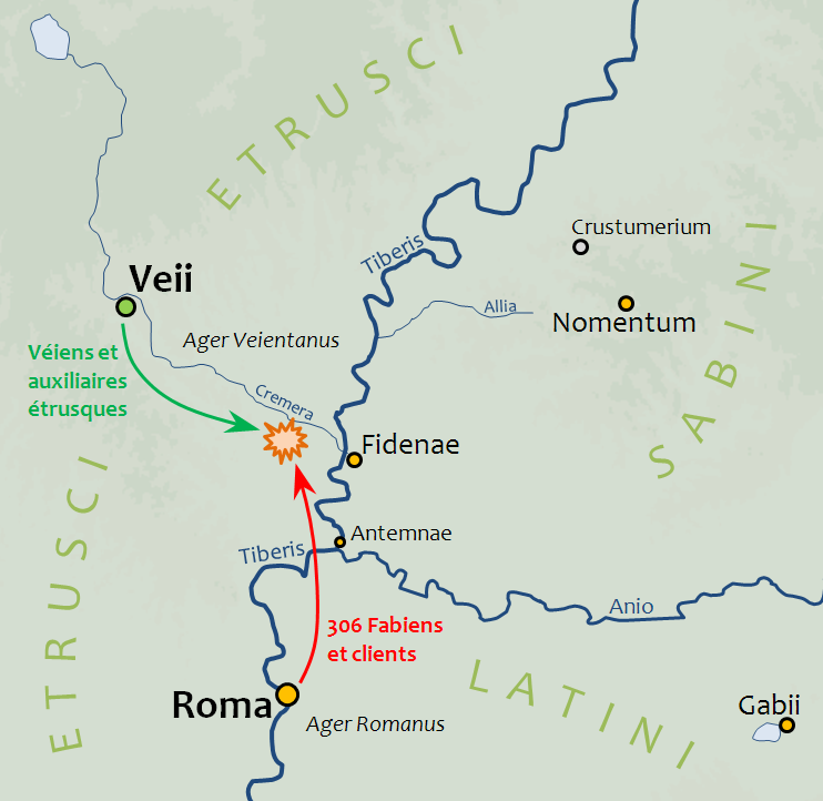 Carte situant le Crémère, Rome et Véies.